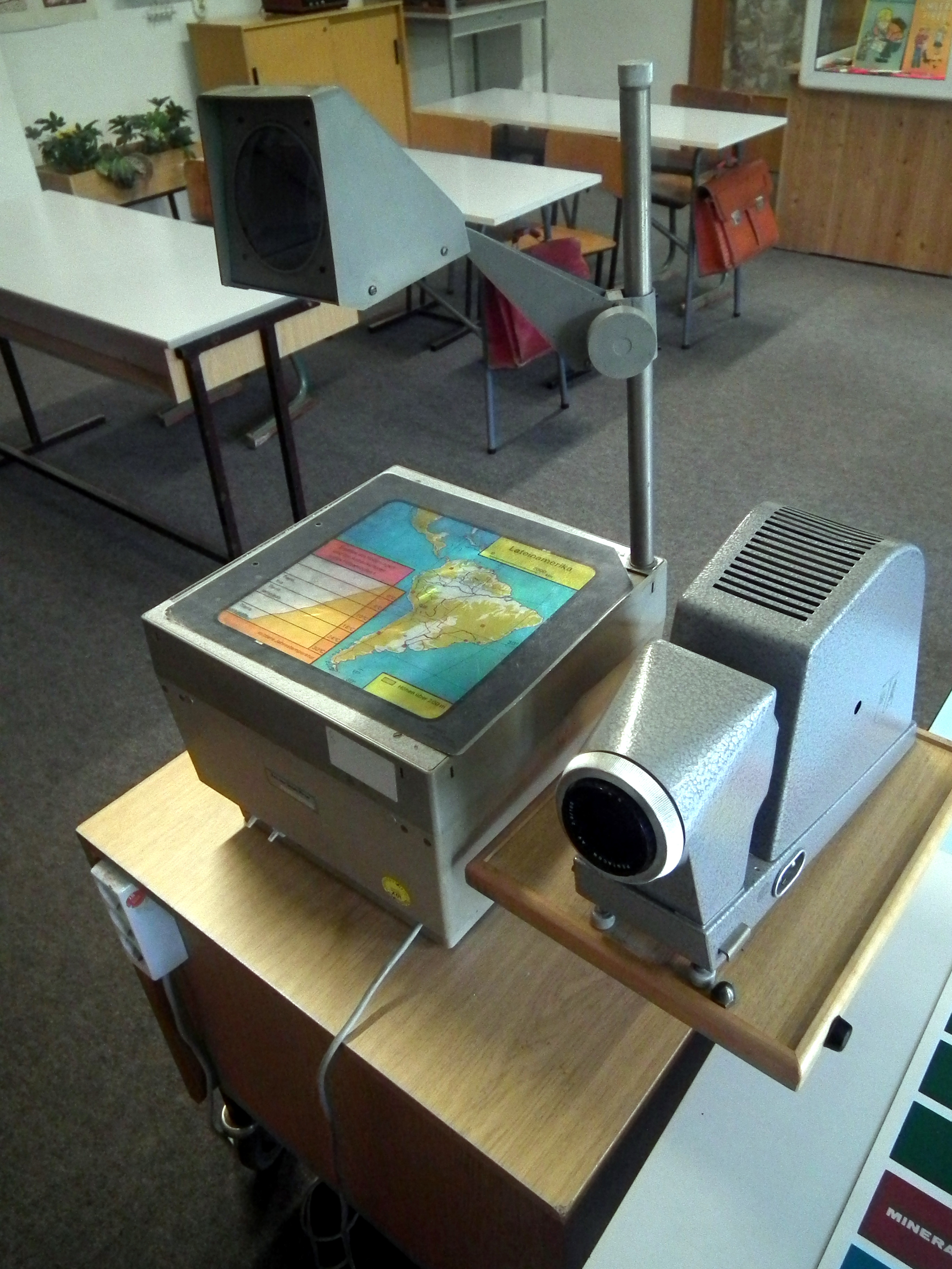 DDR-Museum Pirna, Polylux, Veröffentlicht mit Genehmigung der Museumsleitung